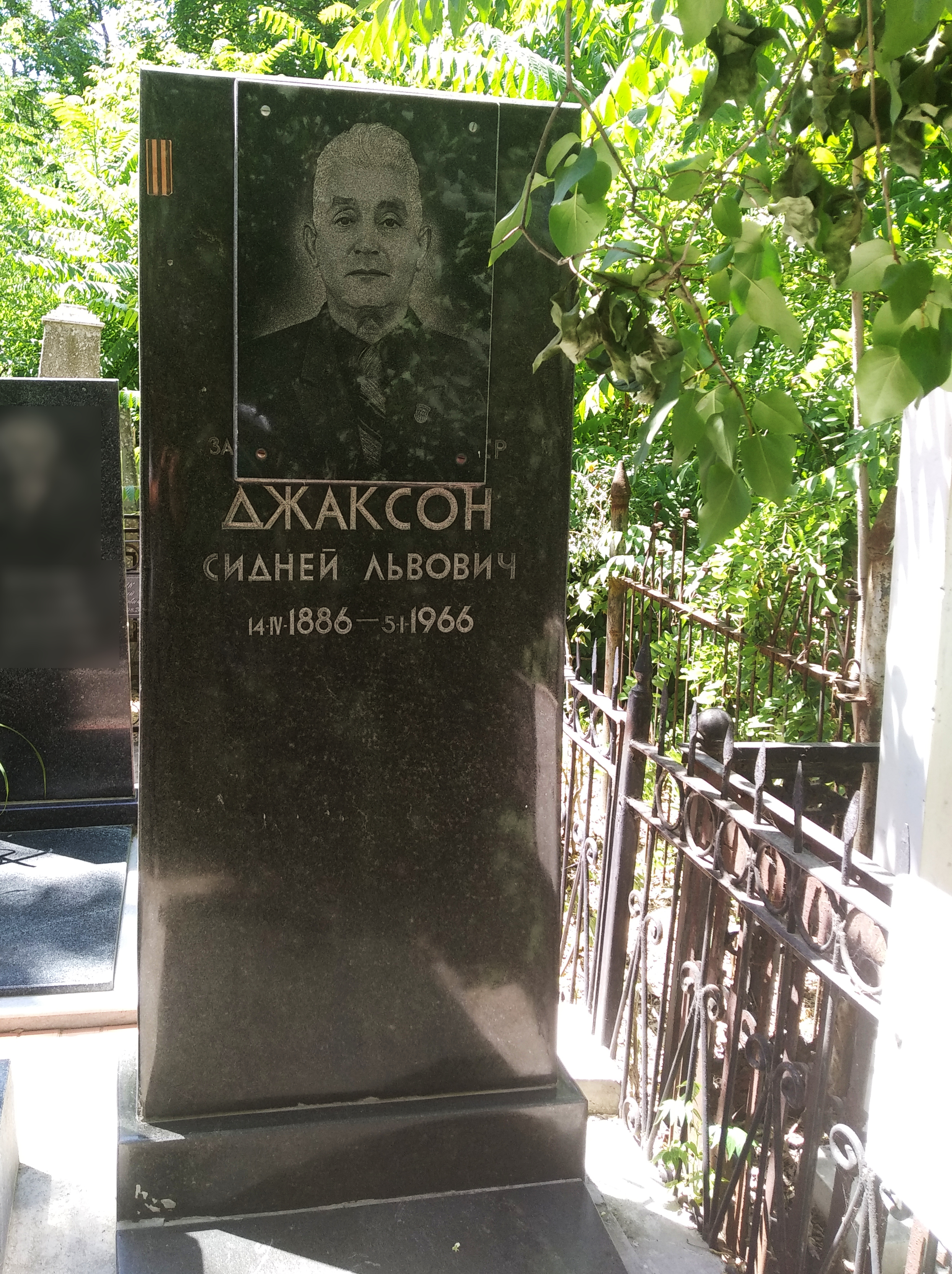 Могила Сиднея Джаксона, на Боткинском кладбище в Ташкенте.